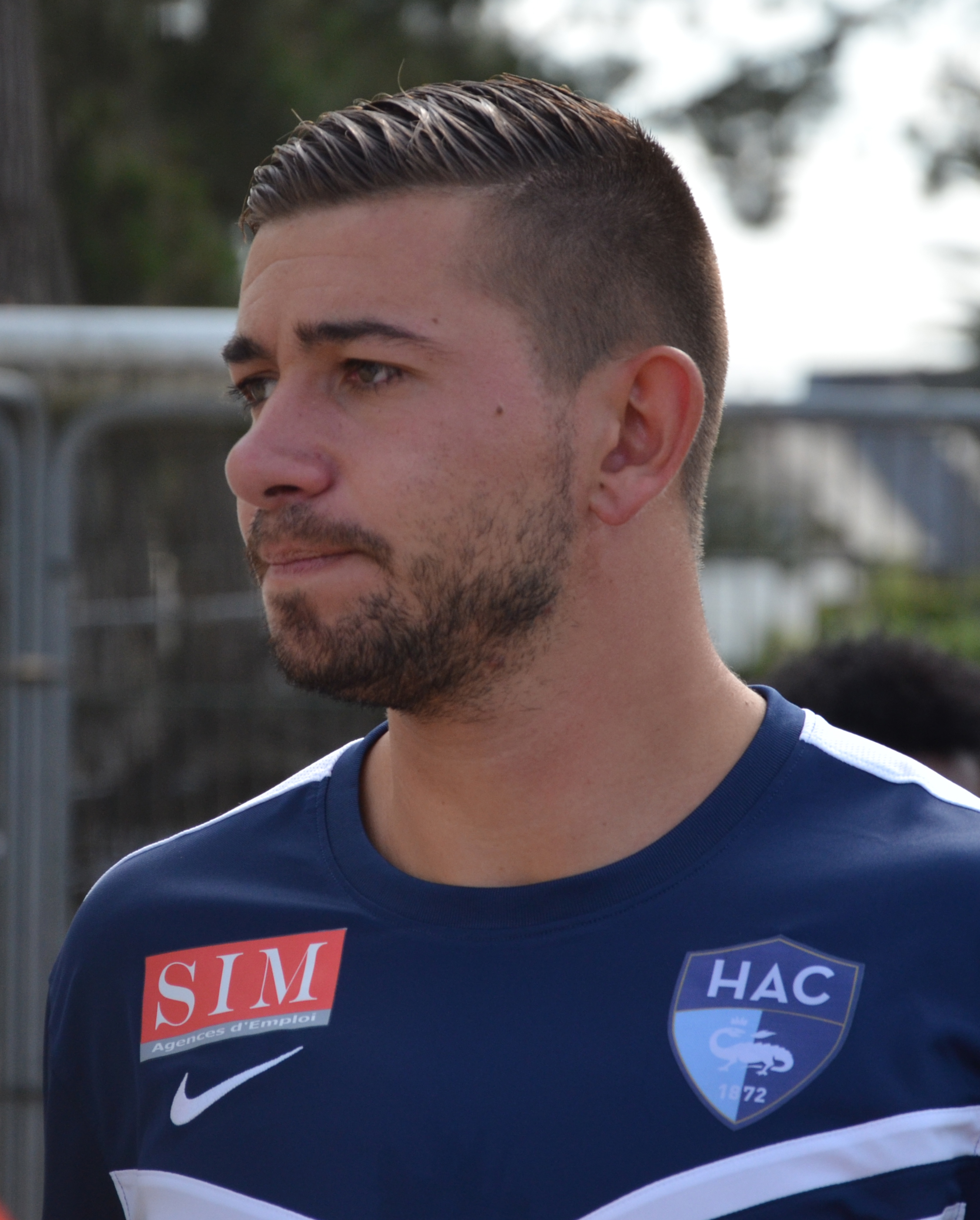 Photographie prise lors du match opposant le Stade rennais au Havre AC en amical au stade Paul-Audrin de Dinard le 8 juillet 2015. Ici, Mickaël Le Bihan.